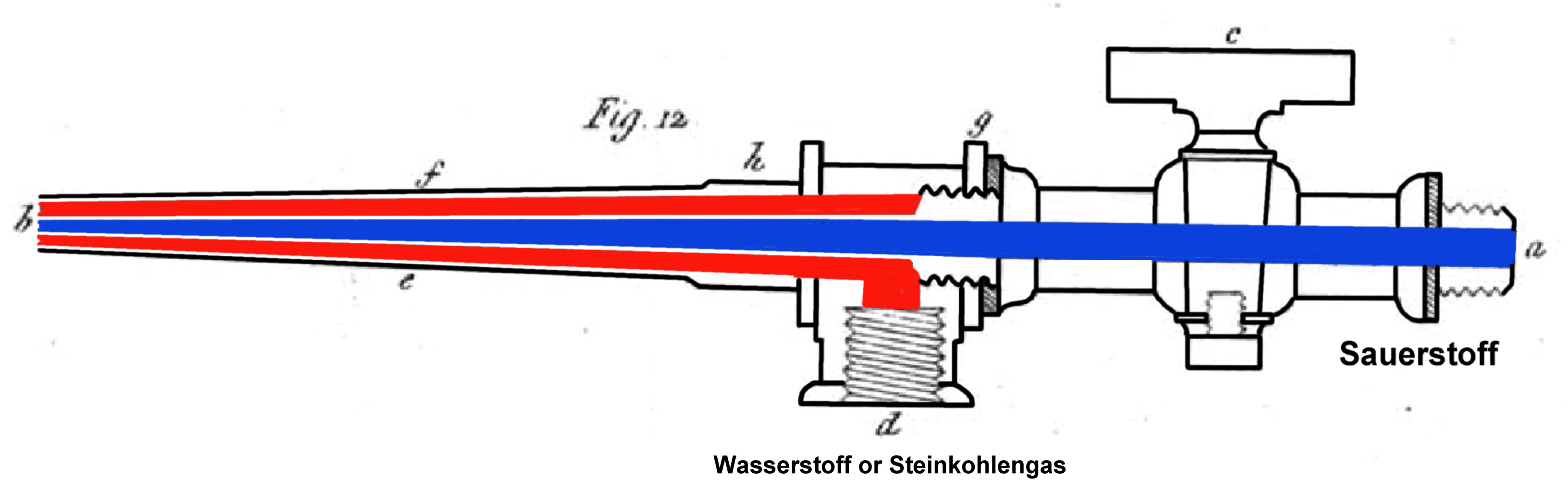 Daniellscher Hahn, Originalzeichnung